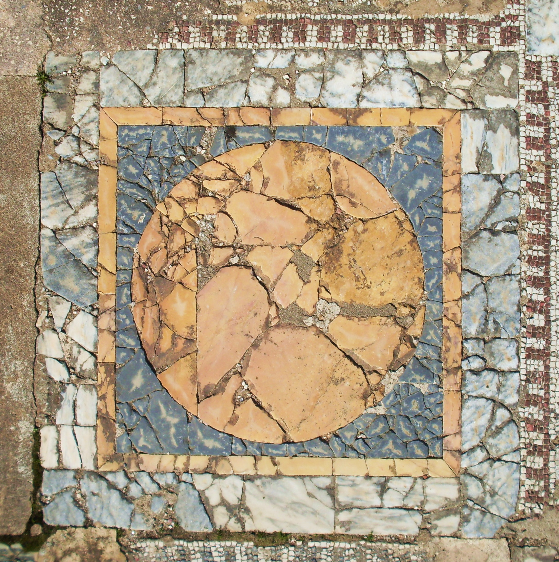 Panneau de la mosaïque des cheveaux: opus sectile